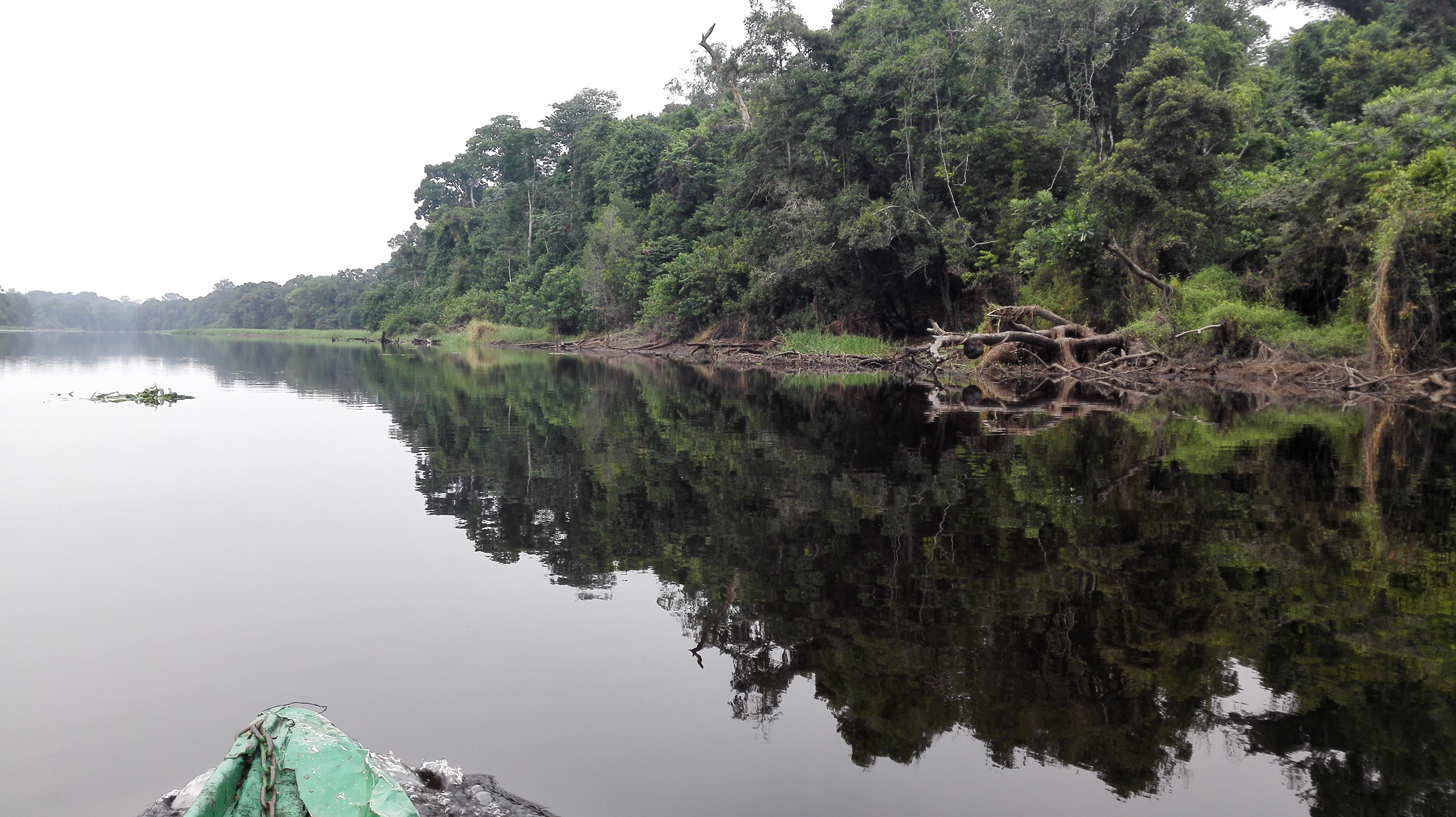 Paysage d'Ebogo, Vue sur le Nyong, Site écotouristique d'Ebogo, Région du Centre, Cameroun.